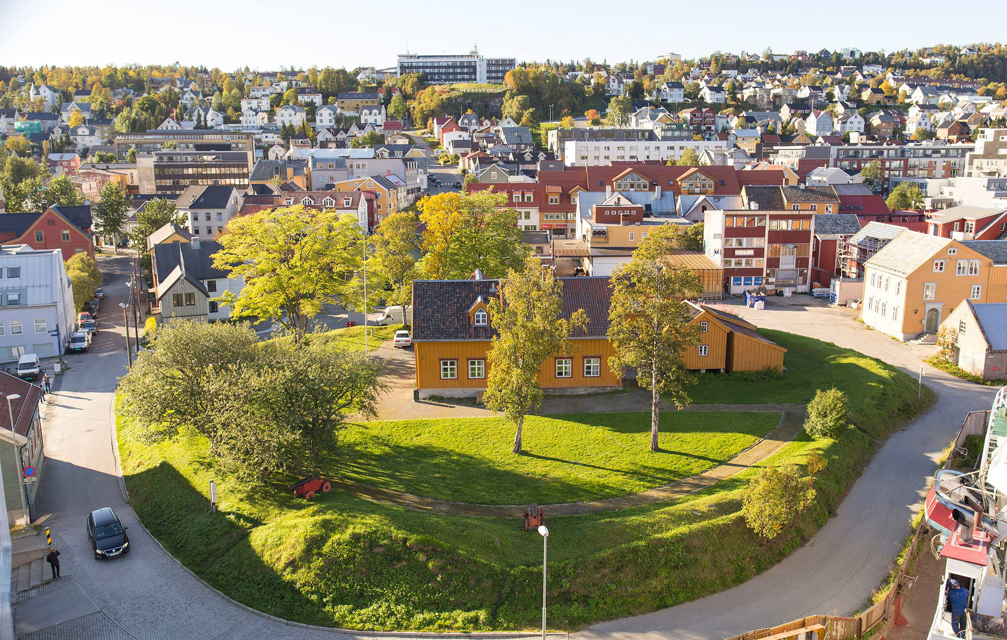 Skansen i Tromsø.